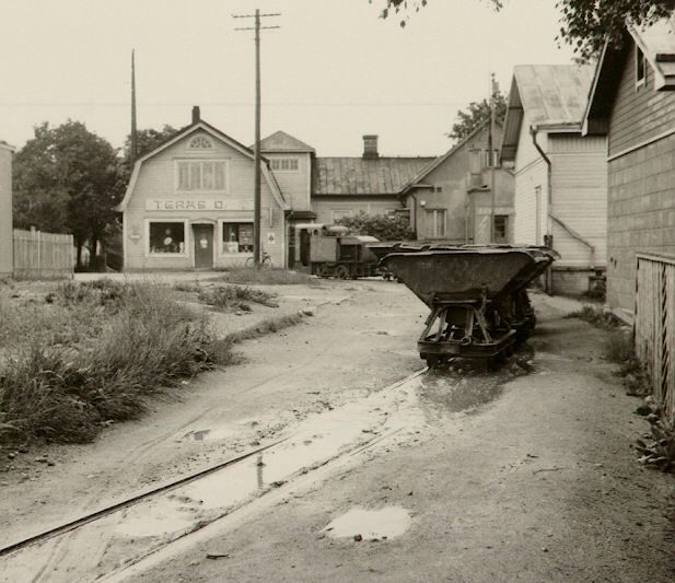 kuva Kupittaan saviradan kuljetuskalustosta